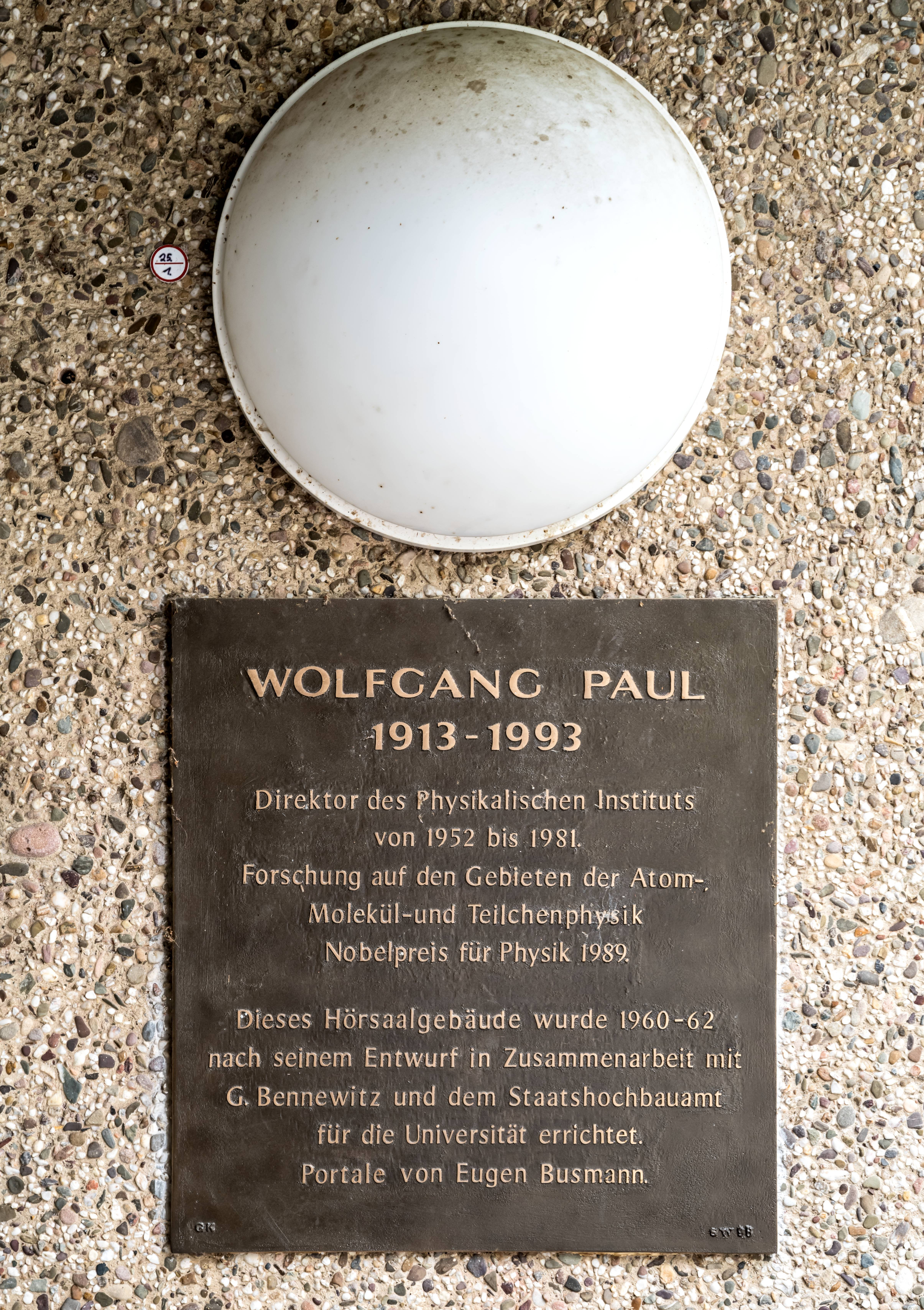 Wolfgang-Paul-Hörsaal der Universität Bonn (größter Hörsaal der Physikalischen Institute), Wegelerstraße 14/Kreuzbergweg 28, Bonn-Poppelsdorf: Informationstafel von Sigrid Wenzel aus dem Jahre 1998